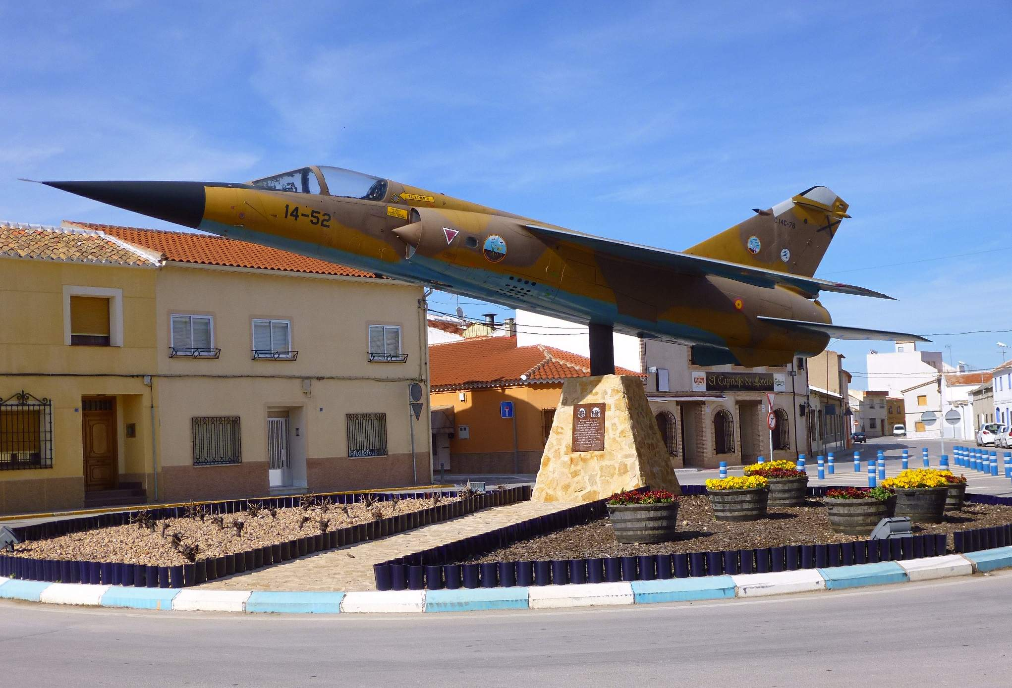 Monumento al Mirage F1, erigido en Socuéllamos en 2010. Esta unidad perteneció al Ejército del Aire de España